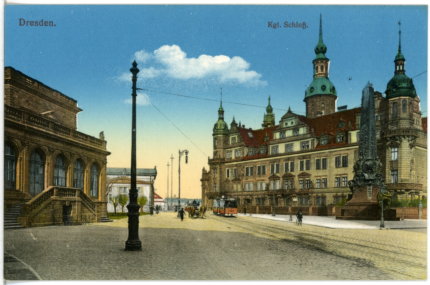 Dresden; Königliches Schloß mit Straßenbahn This postcard is from publisher Brück & Sohn in Meißen ( This postcard has a unique number 18711 and is available in a higher resolution at the publisher. This images was uploaded in a cooperation project between Wikipedians and the publisher.